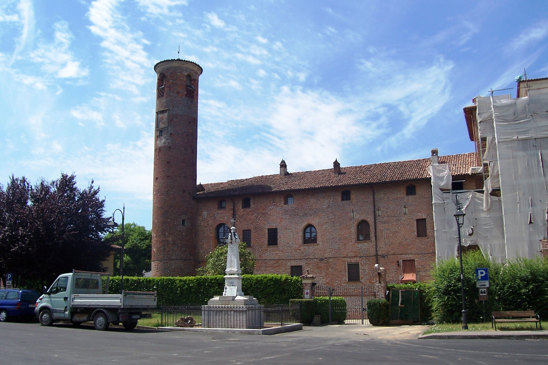 Inverno, borgo medievale in provincia di Pavia